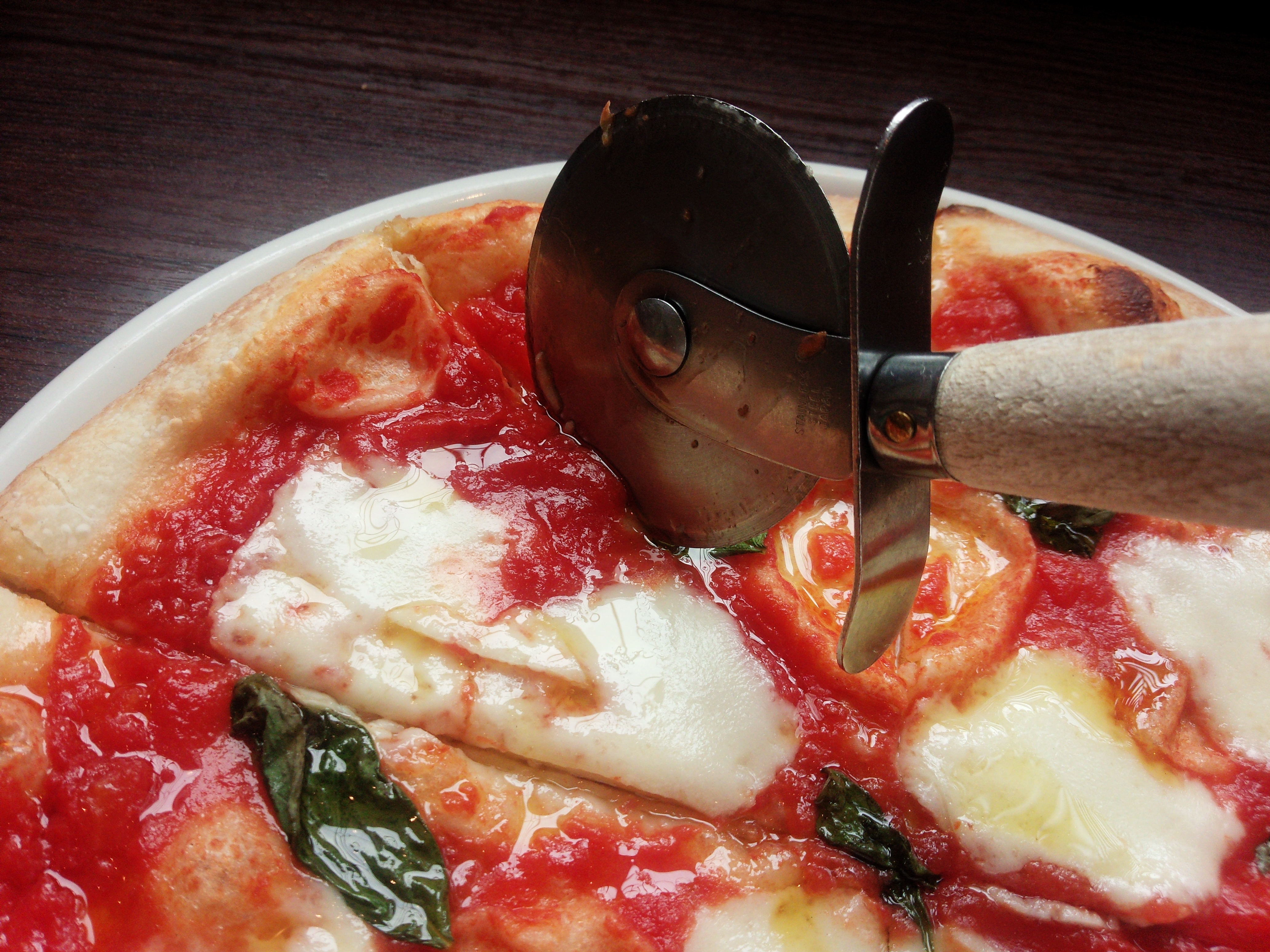 ピザホイールを用いてマルゲリータを切り分ける様子。